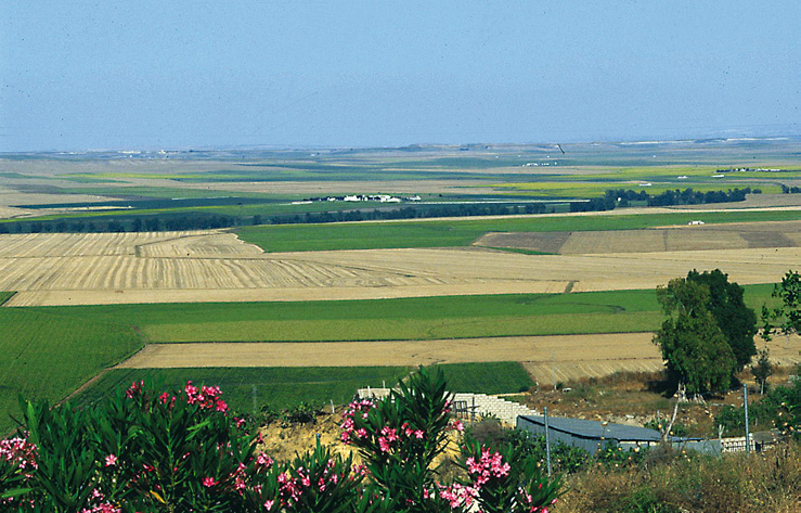 Carmona (comarca La Campiña - Sevilla), 13 de juny de 2000.